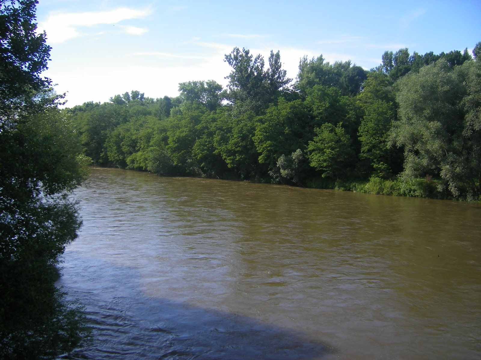 Mura River at Petanjci (Tišina municipality)